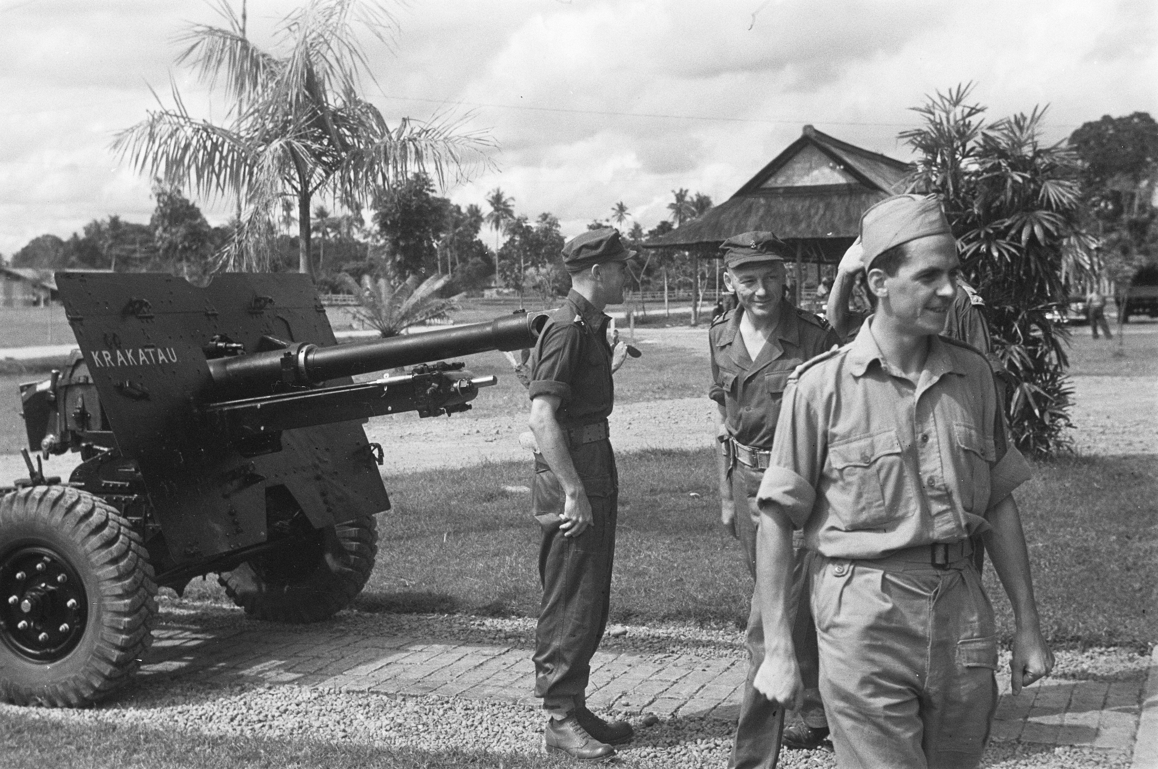 Collectie / Archief : Fotocollectie Dienst voor Legercontacten Indonesië Reportage / Serie : [ onbekend ] Beschrijving : Afdeling Veld Artillerie KNILTwee artillerie-officiere KNIL. Links een 25-ponder met de naam "Krakatau" Datum : 1947/01/01 Locatie : Indonesië, Nederlands-Indië Fotograaf : Fotograaf Onbekend / DLC Auteursrechthebbende : Nationaal Archief Materiaalsoort : Negatief (zwart/wit) Nummer archiefinventaris : bekijk toegang 2.24.04.02 Bestanddeelnummer : 5955